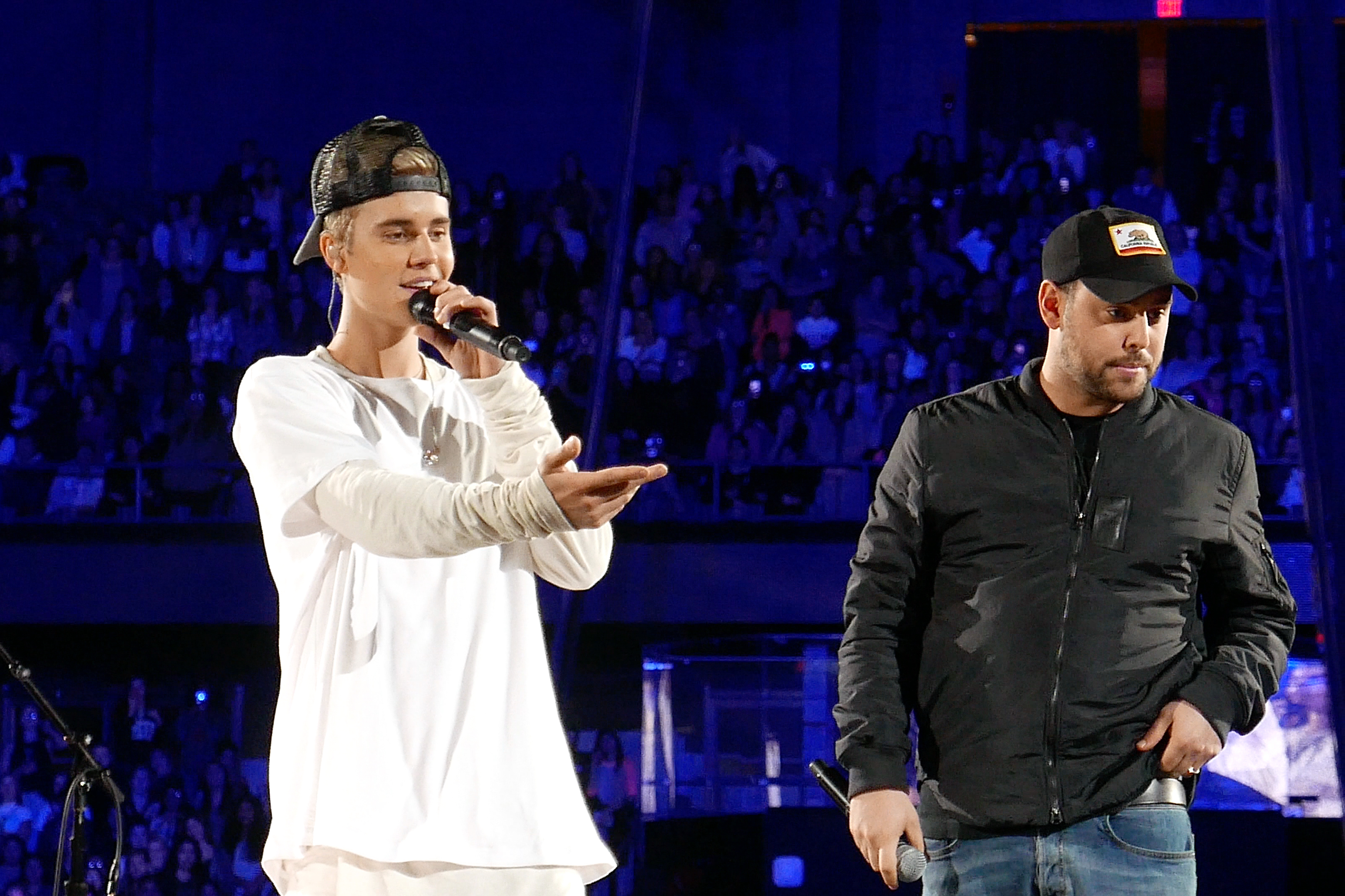 Justin Bieber durante un concierto en el Allstatae Arena en Rosemont, Illinois (2015)